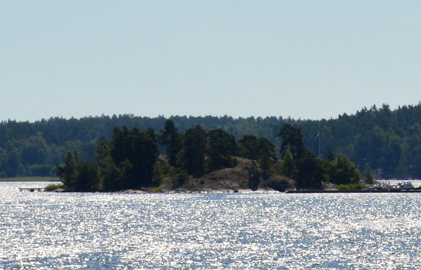 Södra Idskär